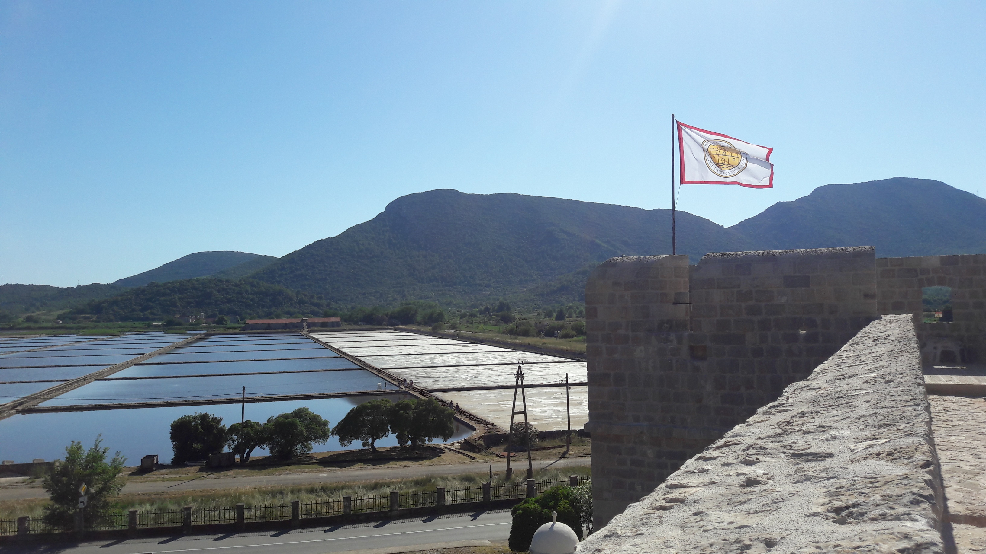 Stonske solane današnjim oblikom koji datira iz doba Dubrovačke republike i ukupnim svojim uređenjem odlično predočuju složenu proizvodnju soli iz srednjeg vijeka, te su prvorazredni spomenik kulture i meta turističkih posjeta.